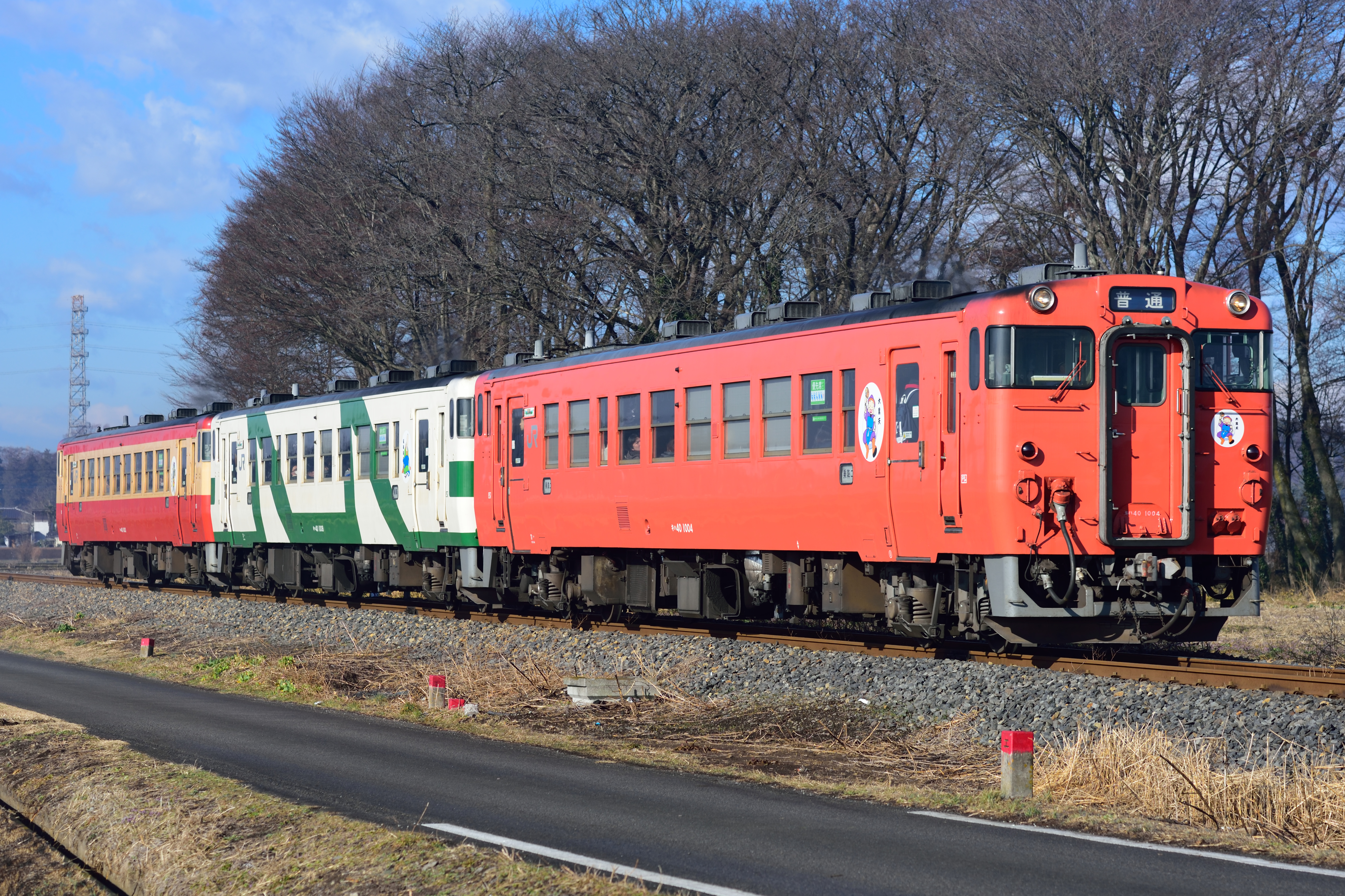 JR烏山線 キハ40系。宝積寺～下野花岡。3両編成。